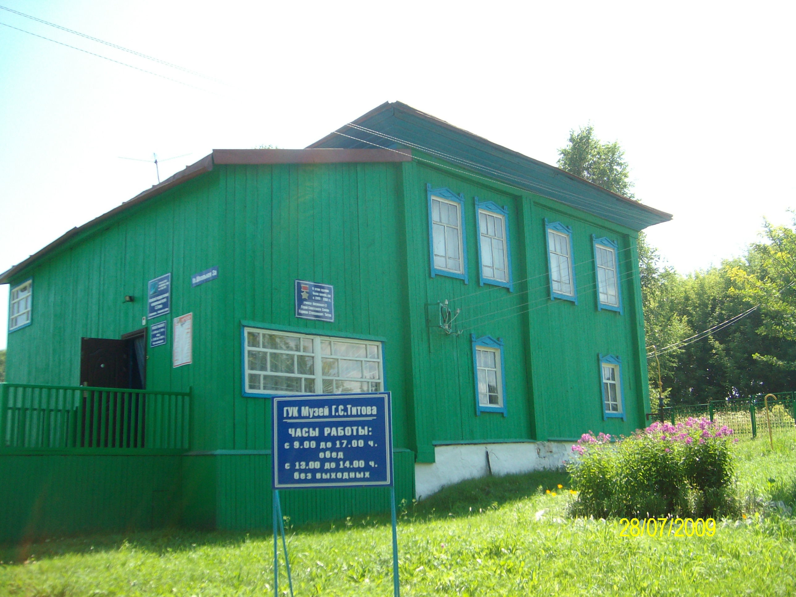 Старое здание мемориального Музея космонавта Г.С. Титова. Здание начальной школы, в которой учился Г.С. Титов